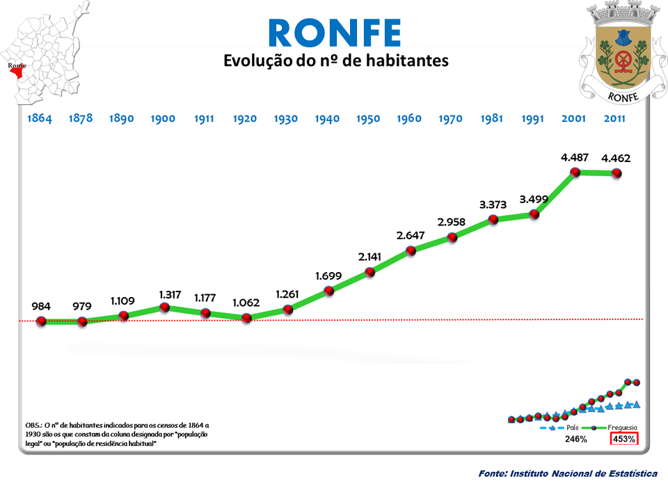 Censo 2011